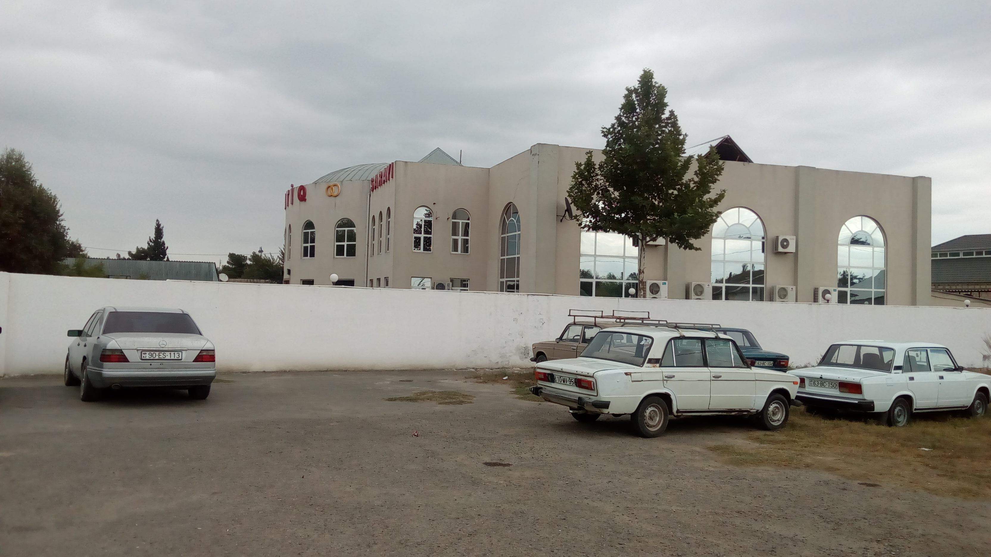 Zərdab, Natiq Şadlıq Sarayı